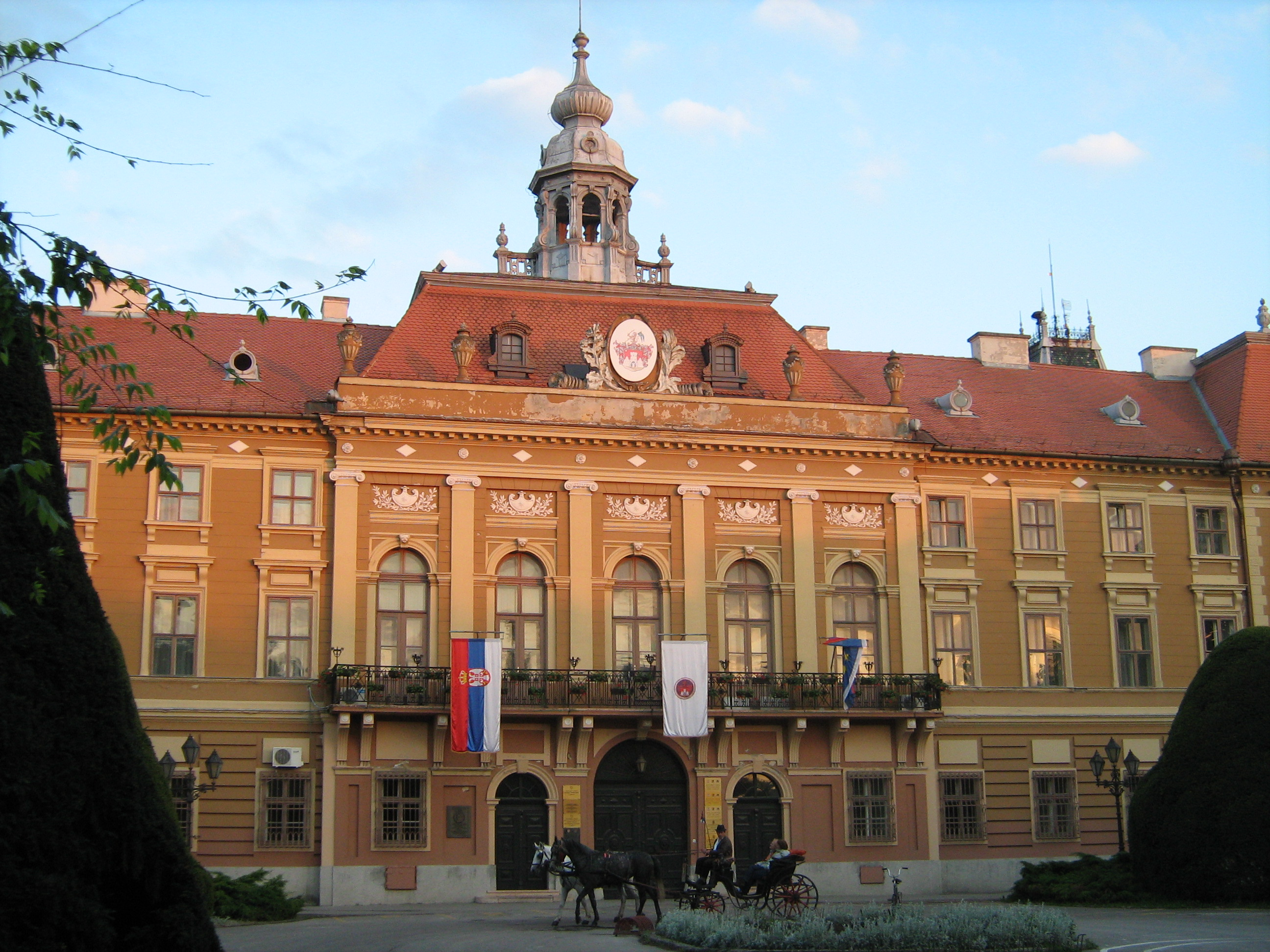 Жупанија у Сомбору